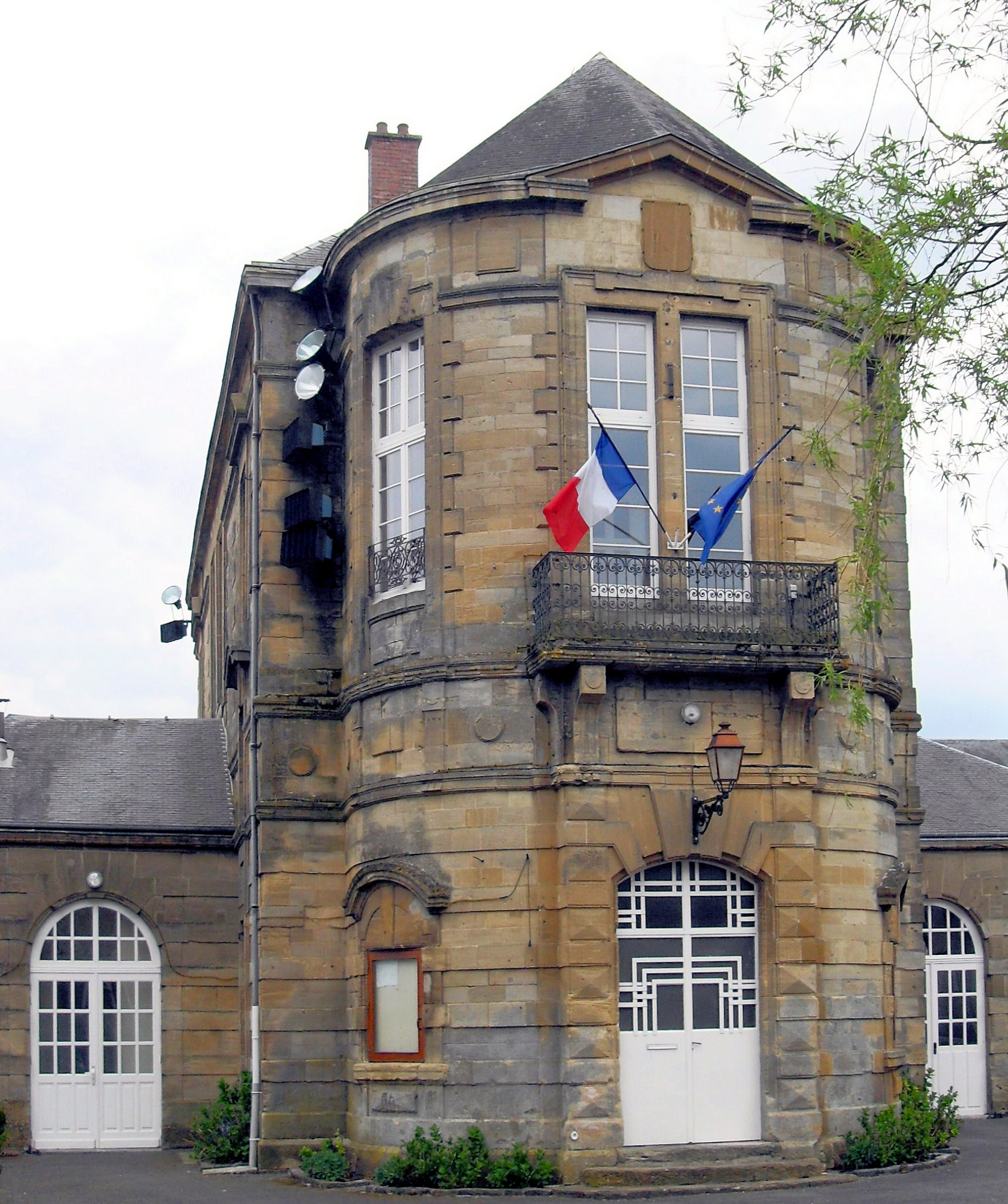 La mairie de Beaumont-en-Argonne